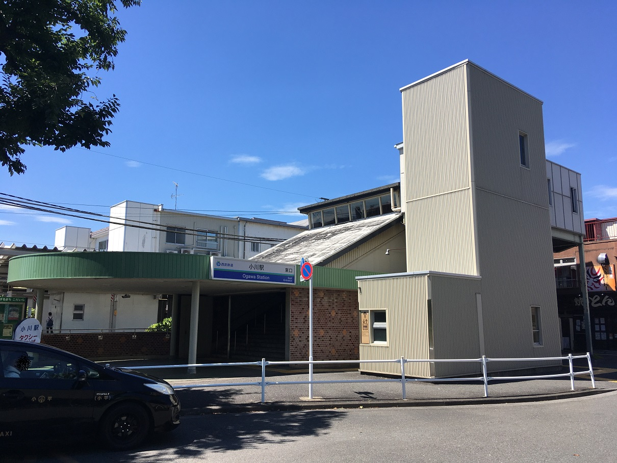 西武鉄道小川駅東口駅舎